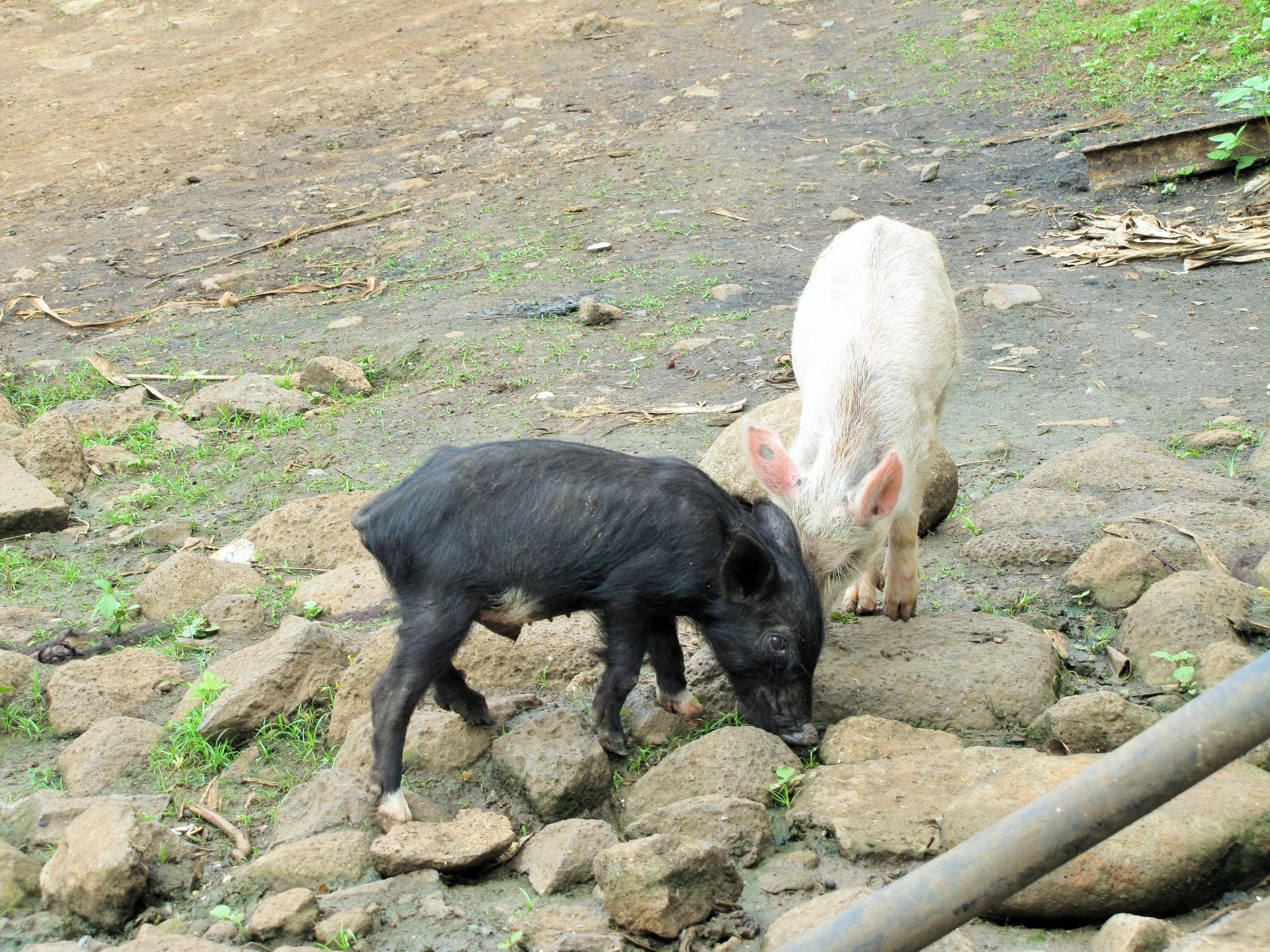 Sao Tome Ponta Figo Hike Piglets